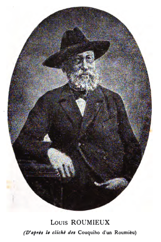 Lois Romieu